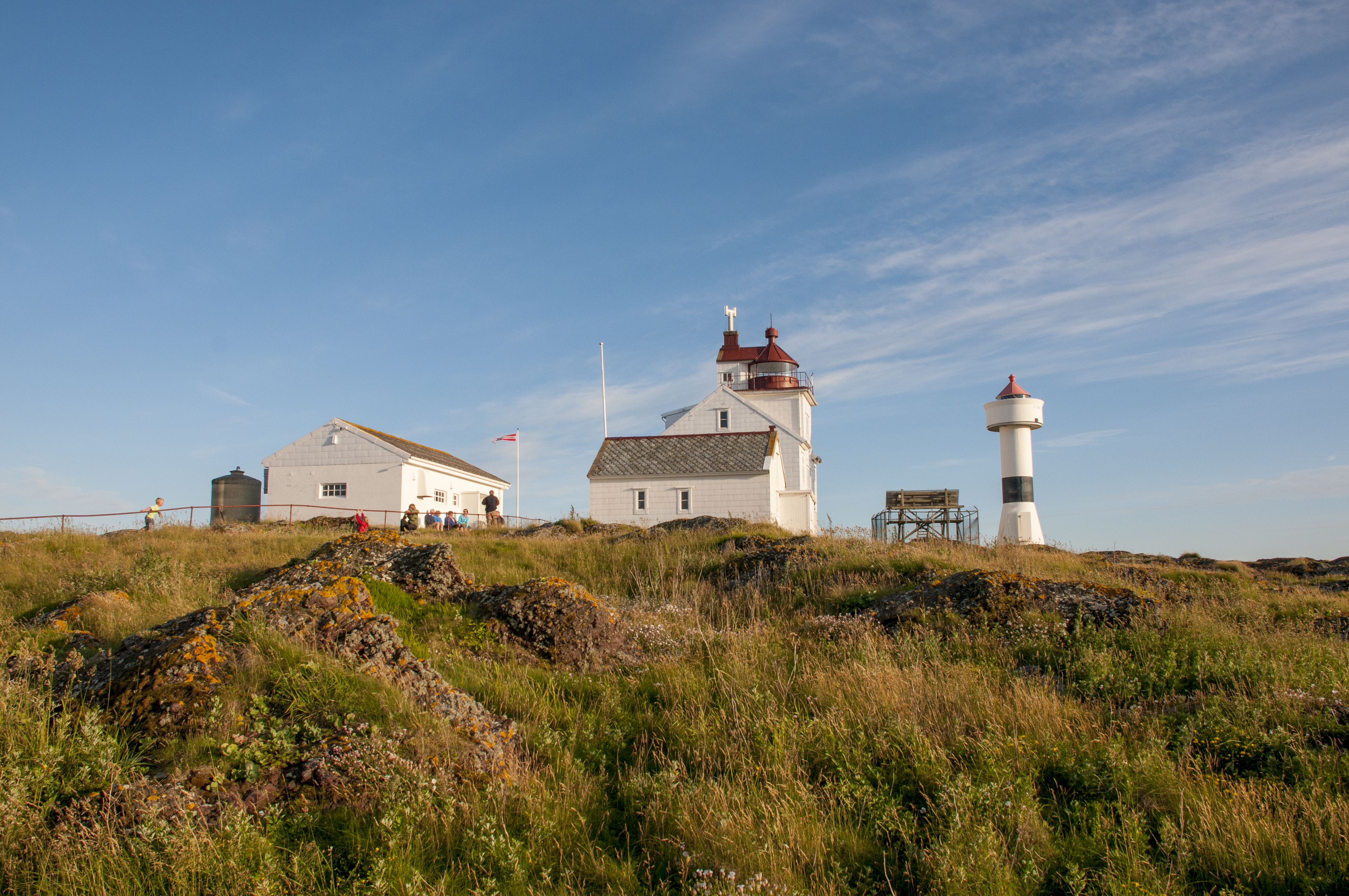 Struten fyr i Ytre Hvaler nasjonalpark, Fredrikstad.